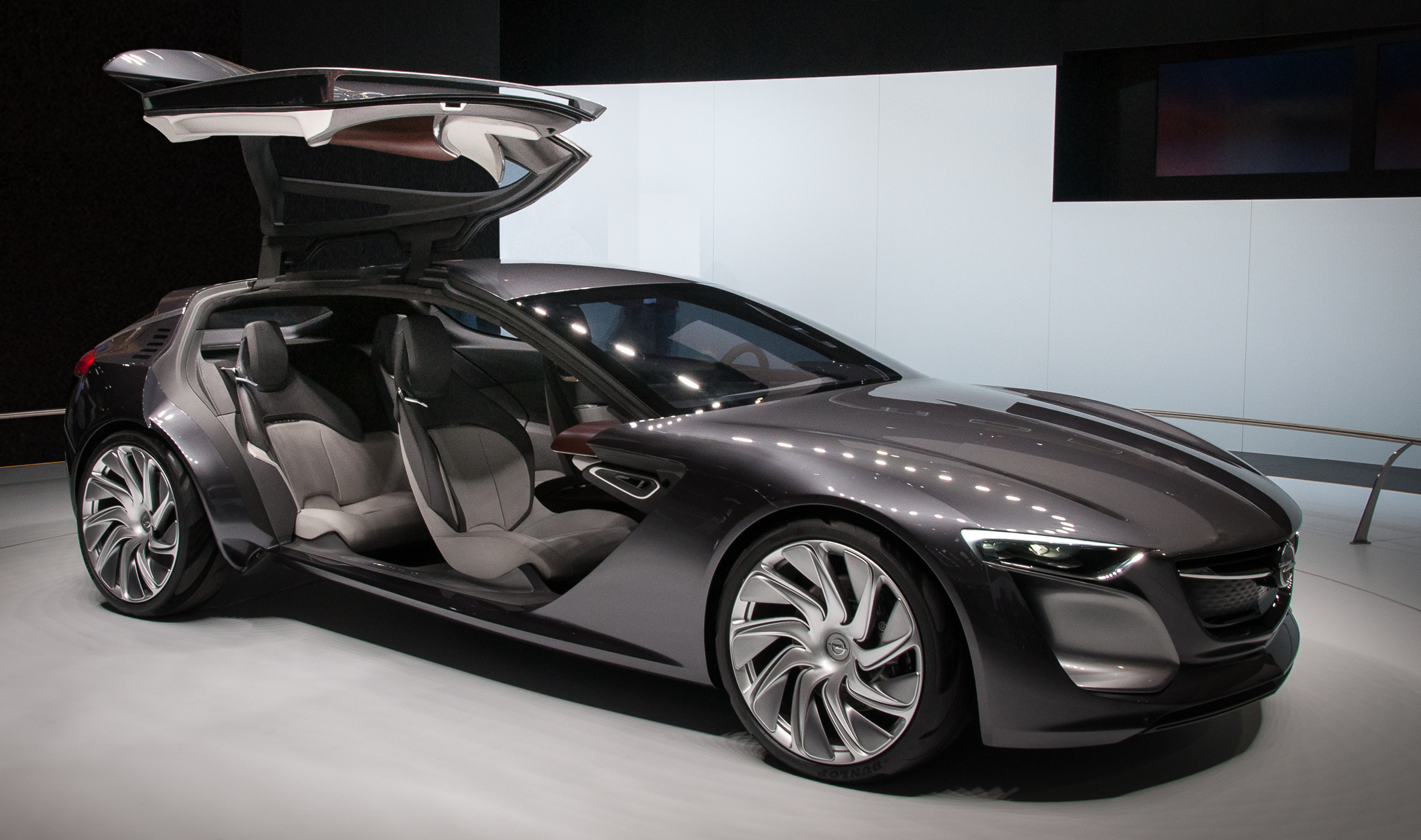 Der Opel Monza Concept auf der IAA 2013 in Frankfurt am Main.